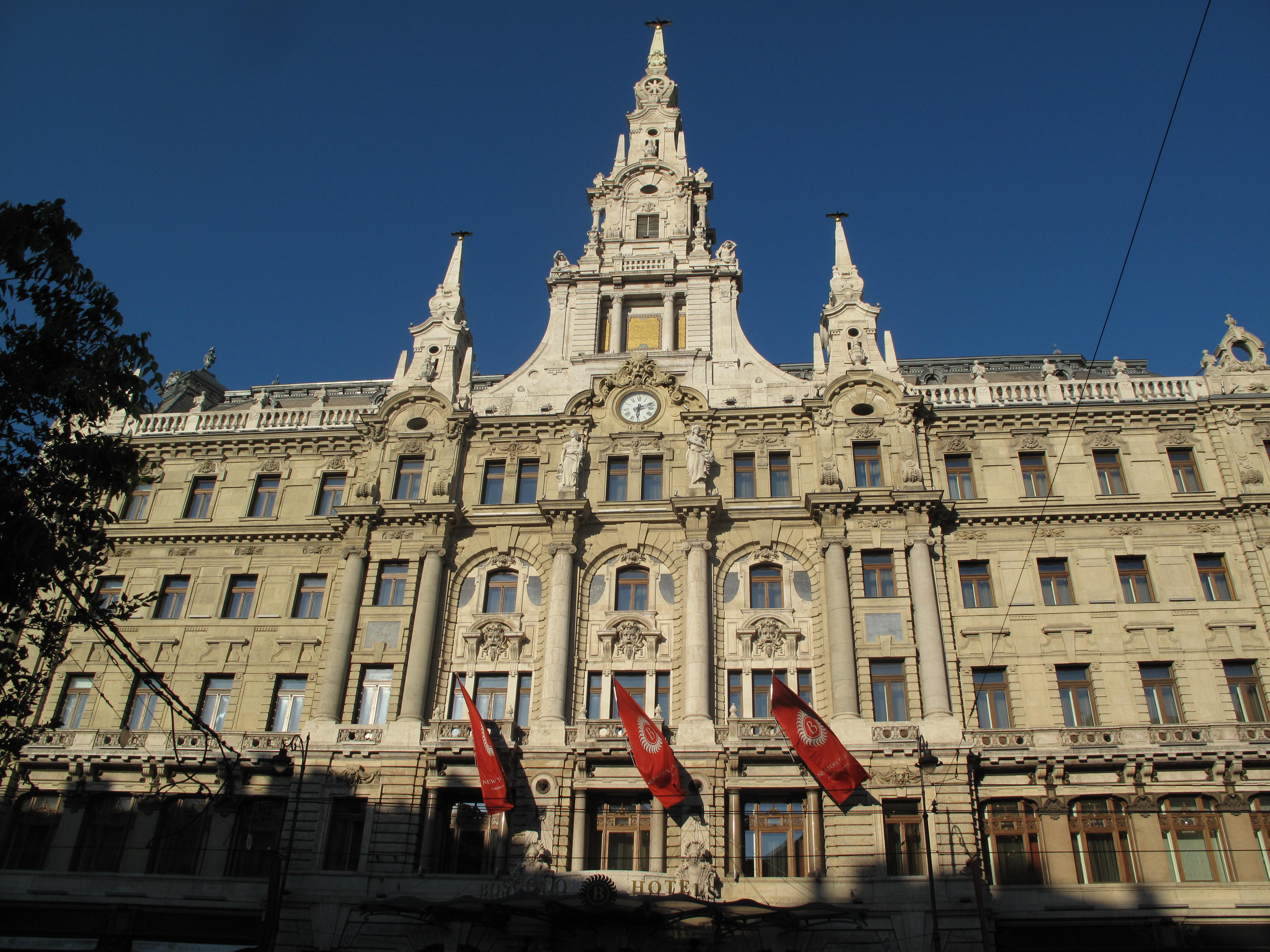 Budapešť